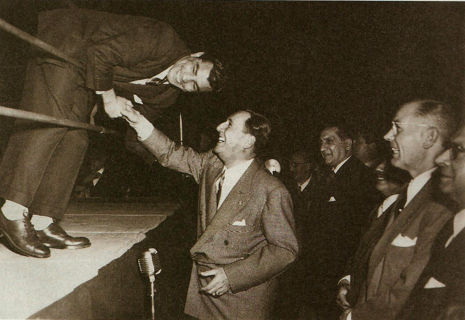 José María Gatica y Juan Domingo Perón, hacia 1950